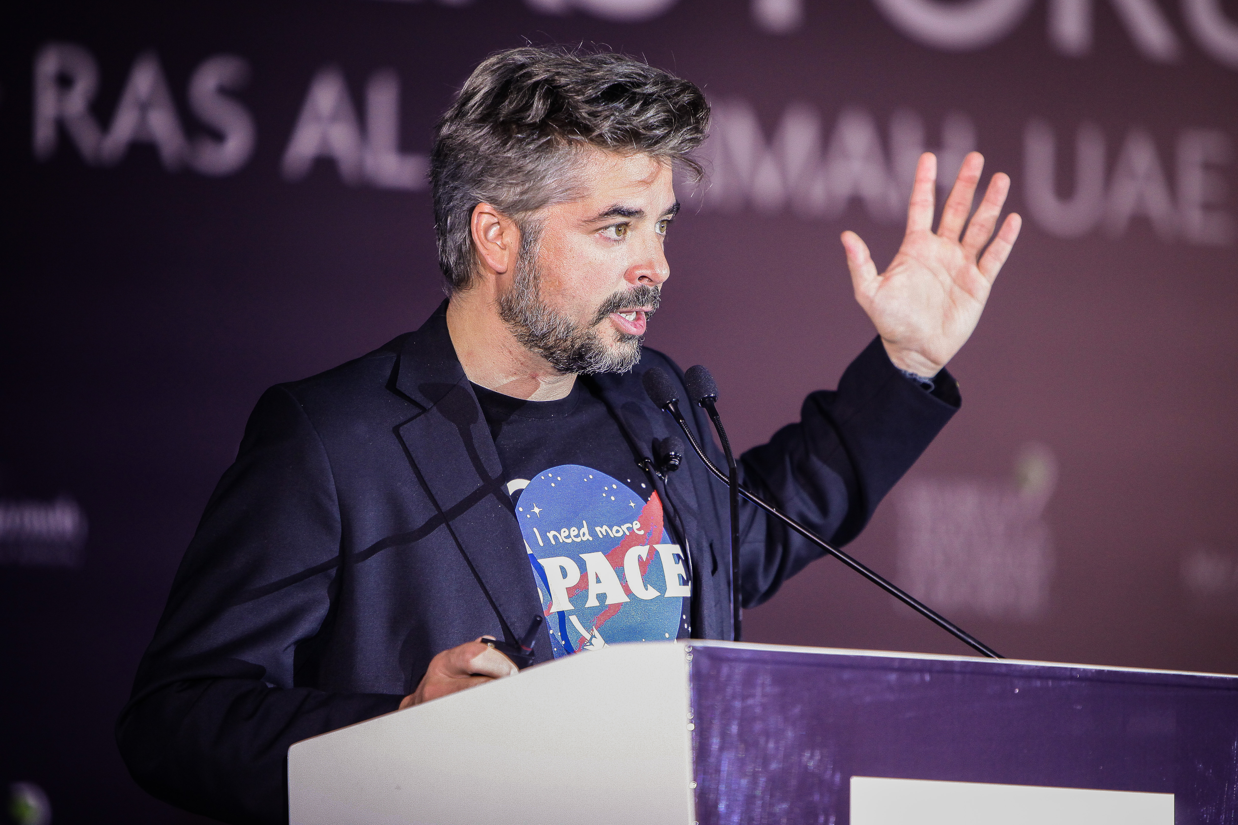 José Mariano López Urdiales, CEO, Zero 2 Infinity by Agora Next